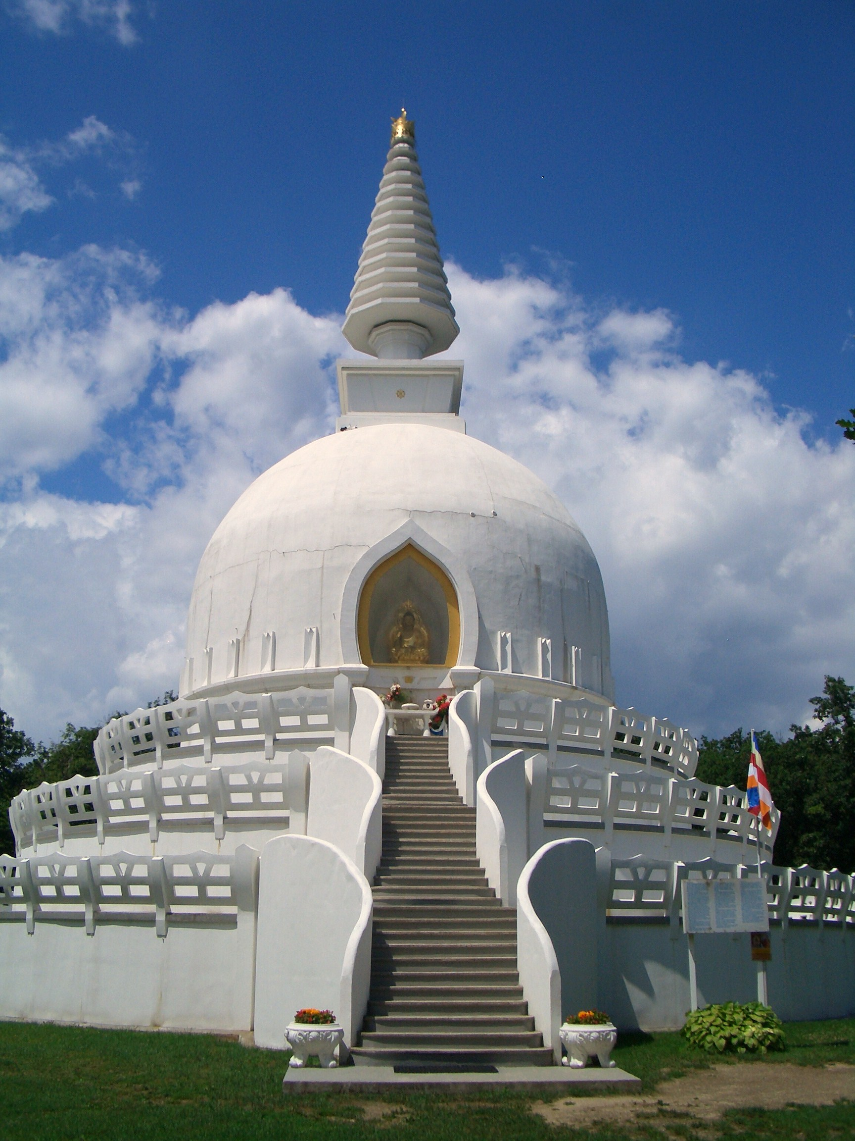 A zalaszántói sztupa (4)